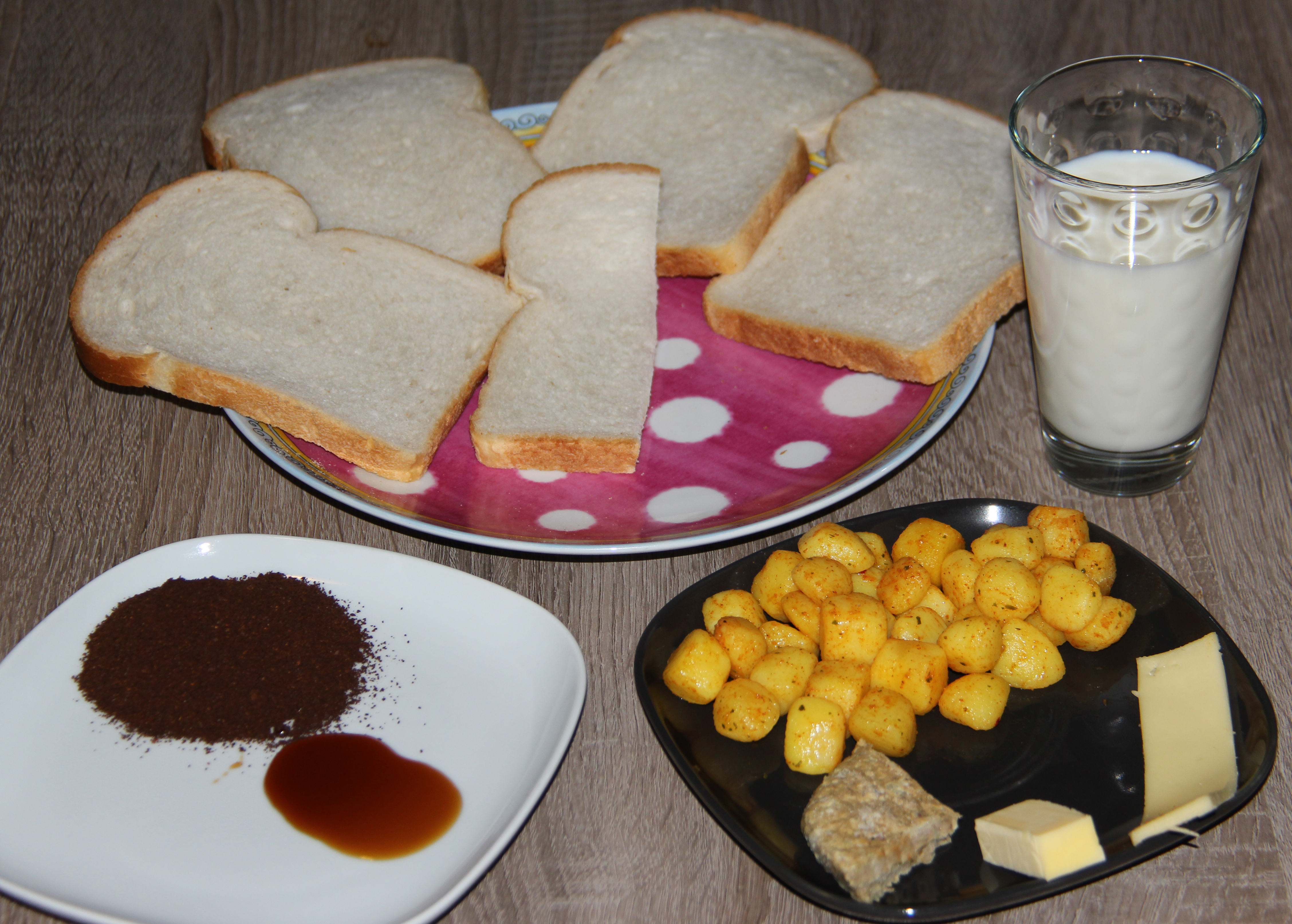 Dagrantsoen verstrekt via voedselbonnen in de periode 26 november tot 23 december 1944 in delen van West-Nederland voor de producten brood (157 gram), margarine (8 gram), vlees (18 gram, inclusief beenderen), aardappelen (143 gram), koffie(surrogaat) (6 gram), kaas (7 gram), stroop (18 gram) en melk (185 milliliter). Gebaseerd op overzicht Tabel 1 van deel 10b (1e deel) van Het Koninkrijk der Nederlanden in de Tweede Wereldoorlog van Loe de Jong.